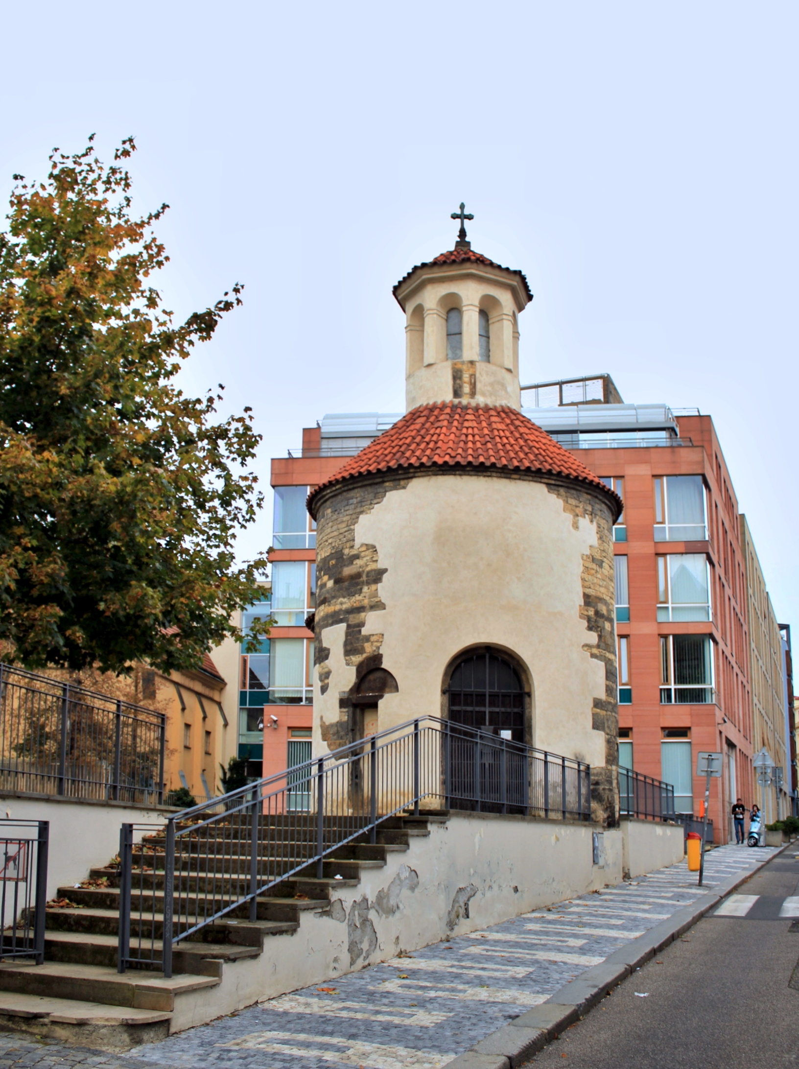 Praha-Nové Město, rotunda sv. Longina